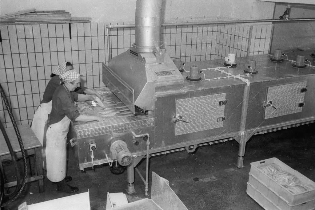 Schockfrosten mit flüssigem Stickstoff bei Firma Kälte 2000 Feinfrost KG Otto Wolter am Seefischmarkt, einer der ersten Firmen in Europa, die dieses Verfahren anwandte.